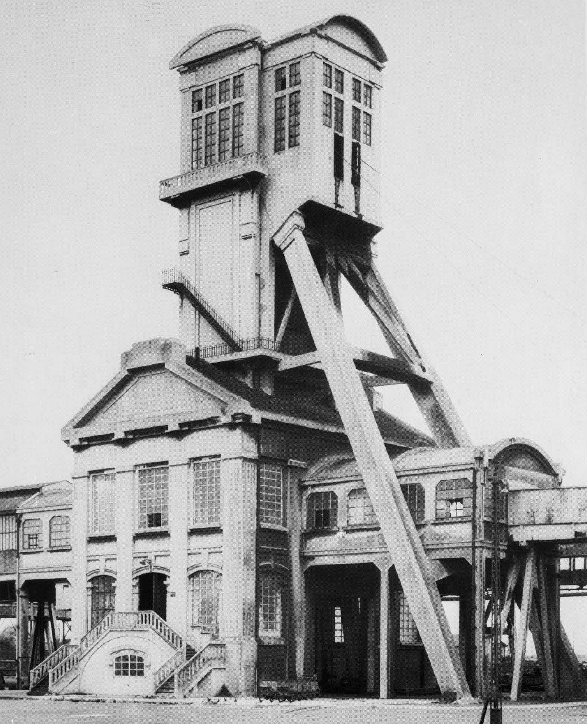 La Fosse n° 1 - 1 bis - 1 ter de la Compagnie des mines de Béthune était un charbonnage constitué de trois puits situé à Bully-les-Mines, Pas-de-Calais, Nord-Pas-de-Calais, France.